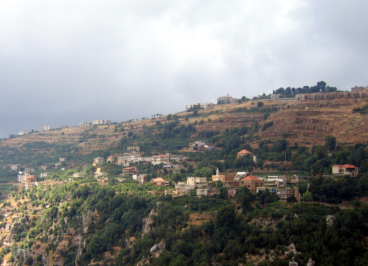 Aintourine_07_07_2006.jpg